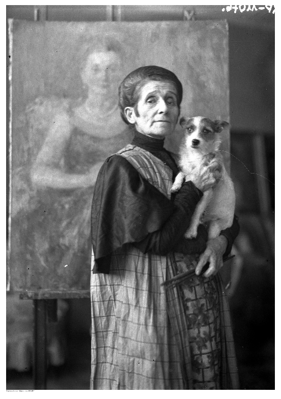 Снимка на Олга Бознанска, полска художничка.